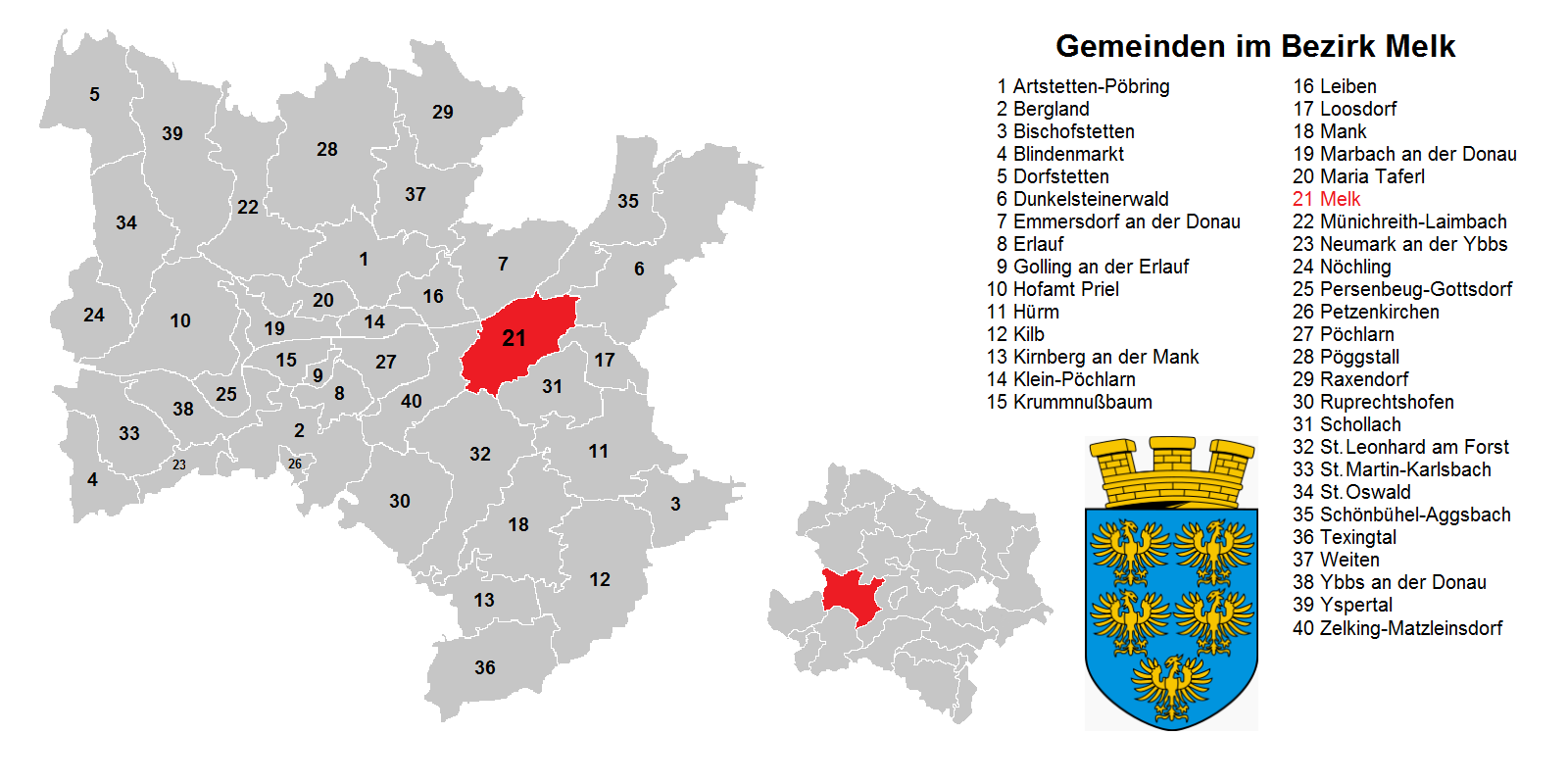 Bezirk Melk